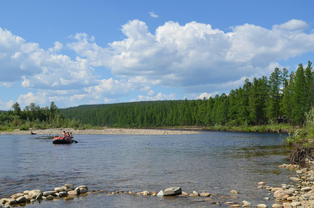 Нерюнгри. Река Чульман возле дачного посёлка РМЗ